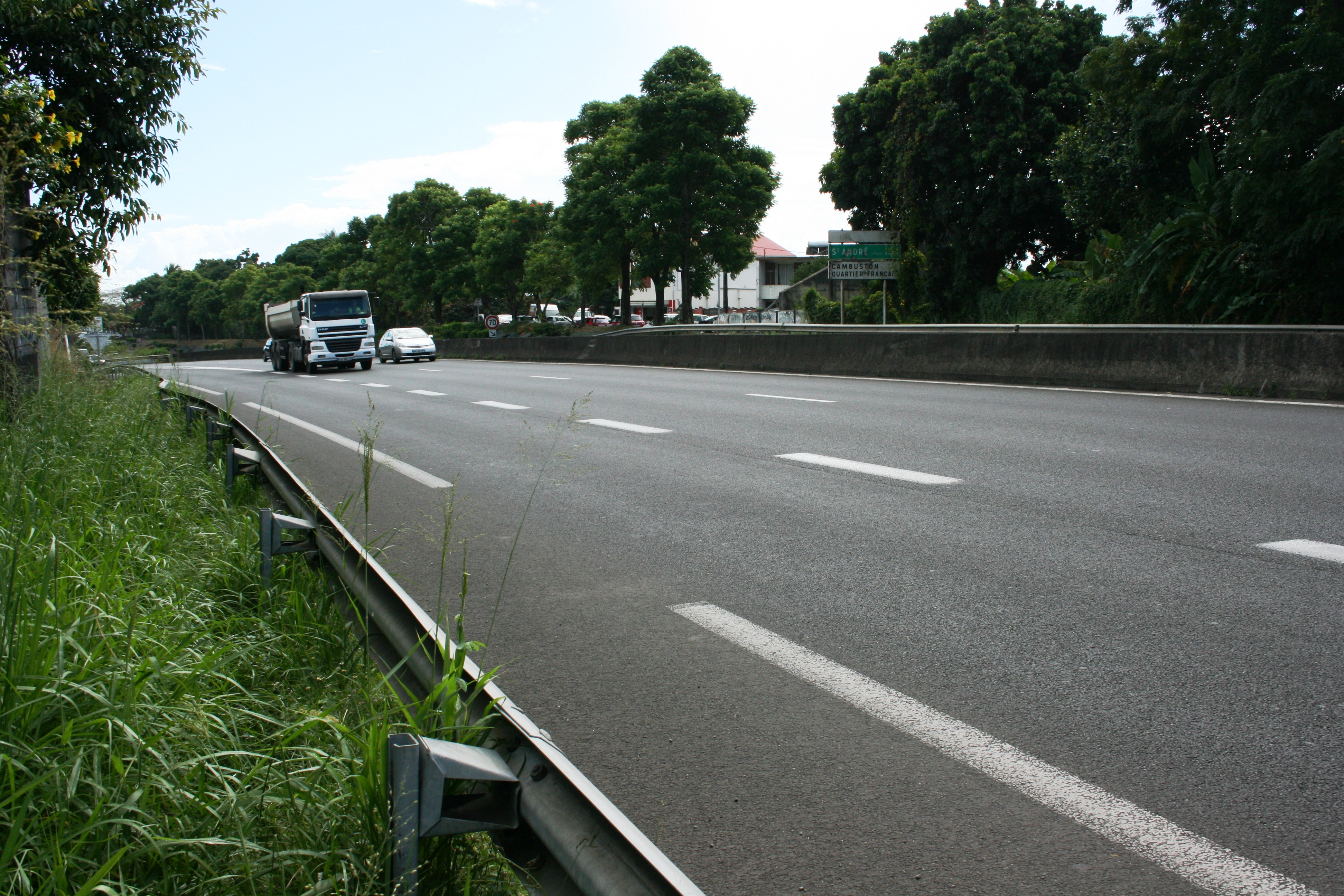 Vue de la route nationale 2 à Saint-André de La Réunion.